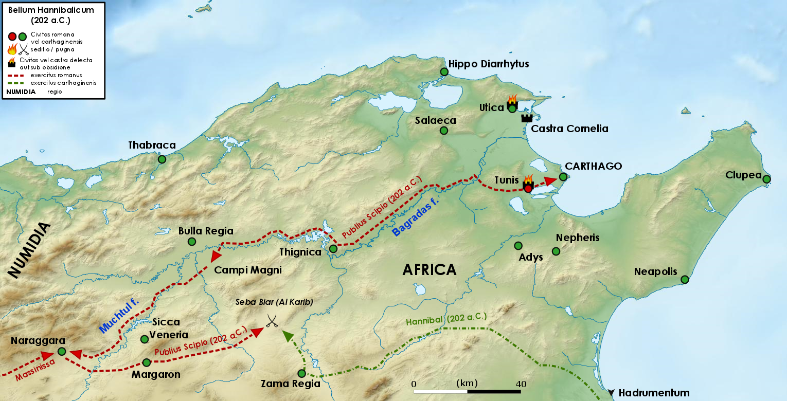 Campagna africana di Scipione Africano contro Annibale, culminata con la battaglia di Zama (202 a.C.)